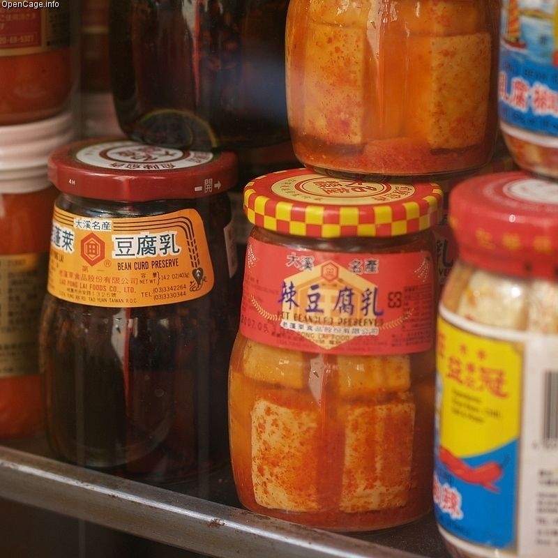 神戸の南京町で売られている腐乳 豆腐を発酵させた中国の食材。独特のコクがあり、中華粥などに入れて食します。 Pickled tofu, Chao, 腐乳 Location 神戸市中央区 南京町